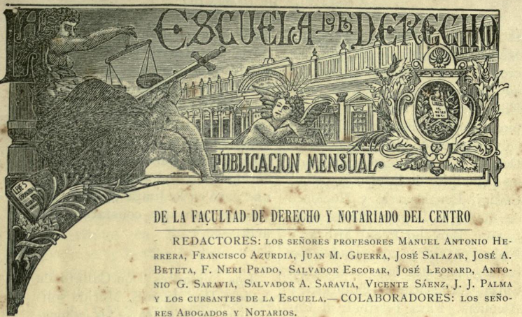 Logo de la Revista La Escuela de Derecho de la Facultad de Derecho y Notariado de la Universidad de San Carlos de Guatemala.